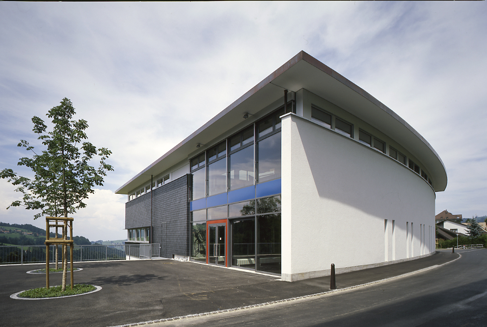 Aula, Kantonsschule Trogen